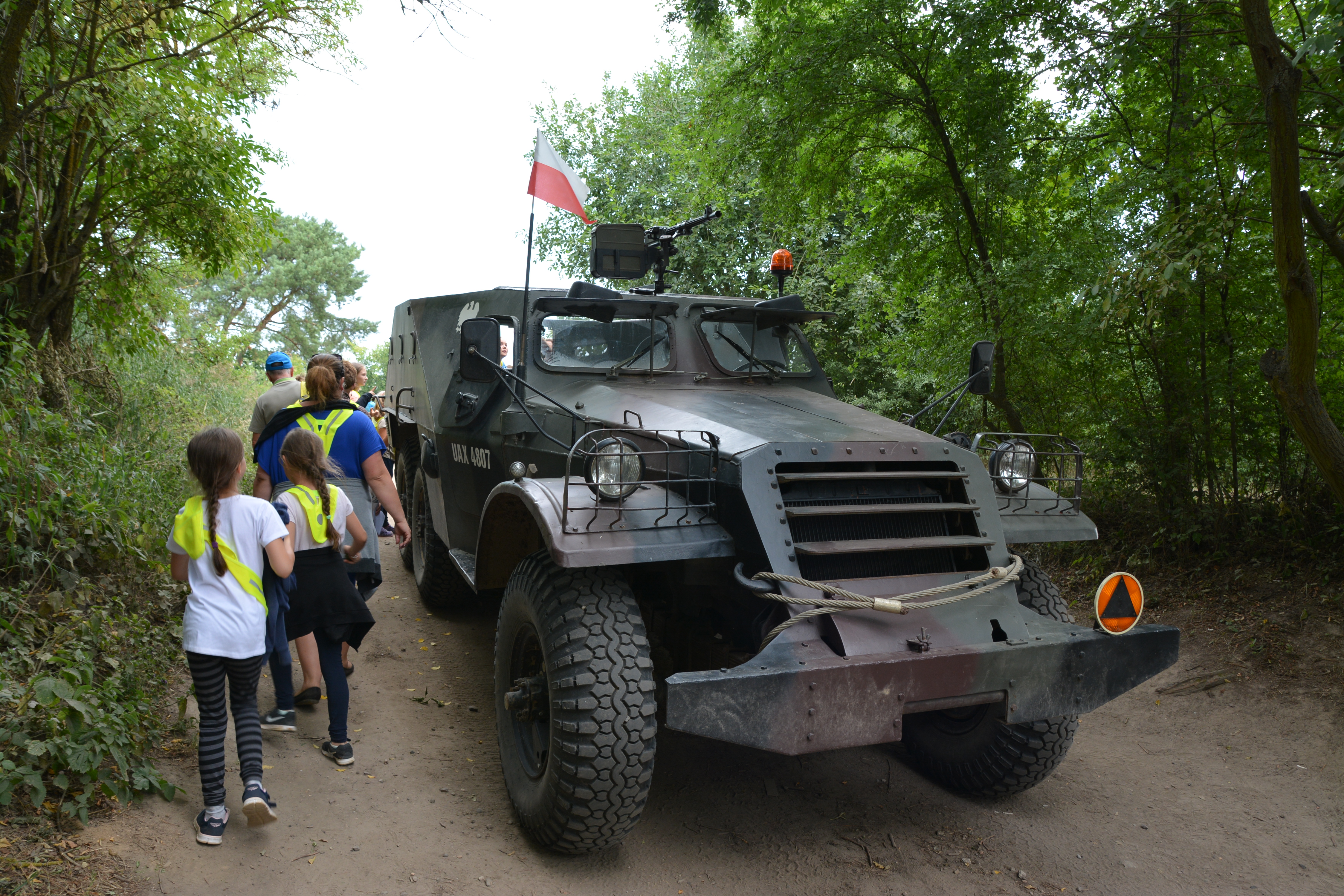 MRU - Muzeum Fortyfikacji i Nietoperzy w Pniewie